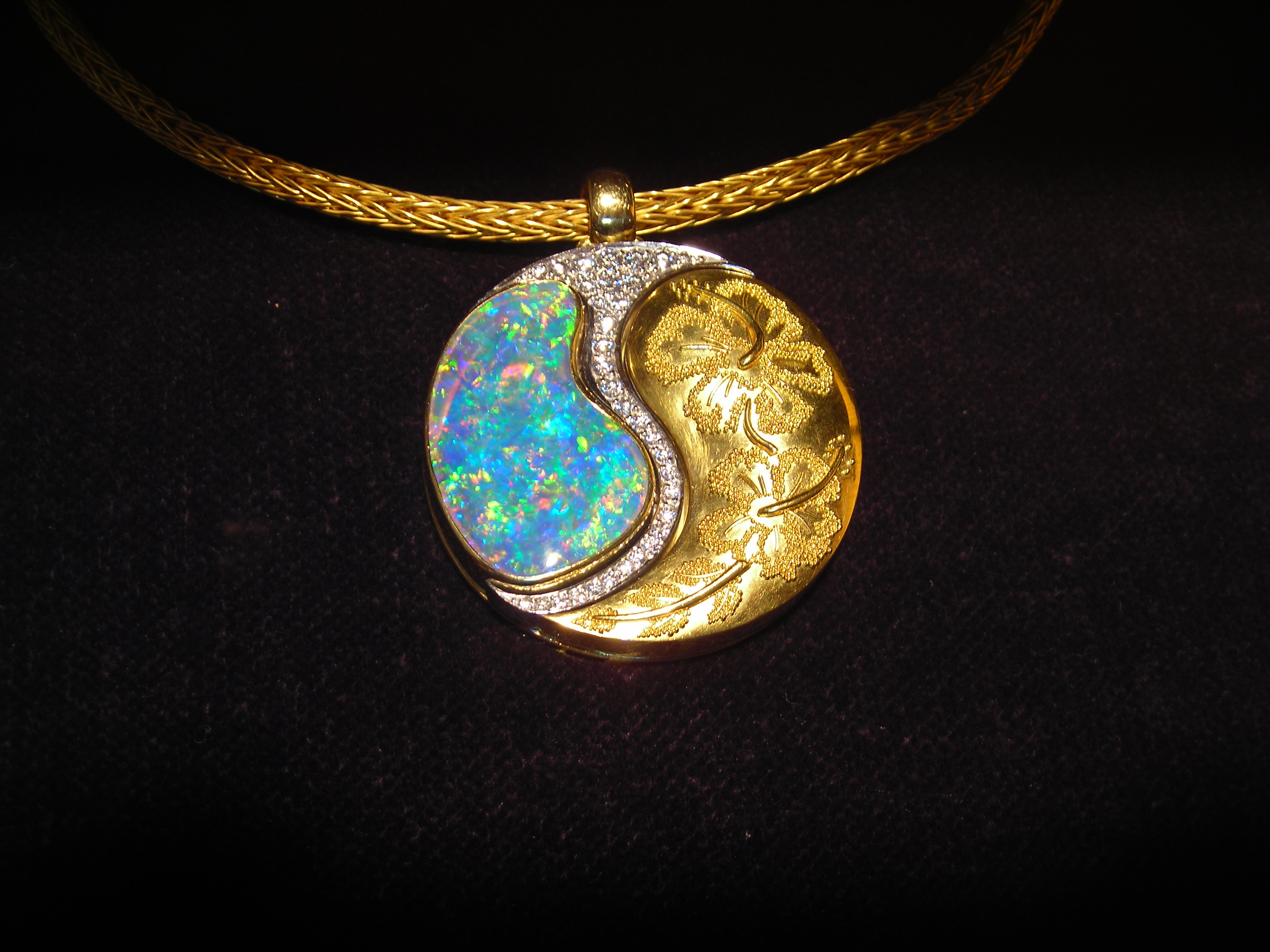 Schmuckanhänger mit Opal und Gold